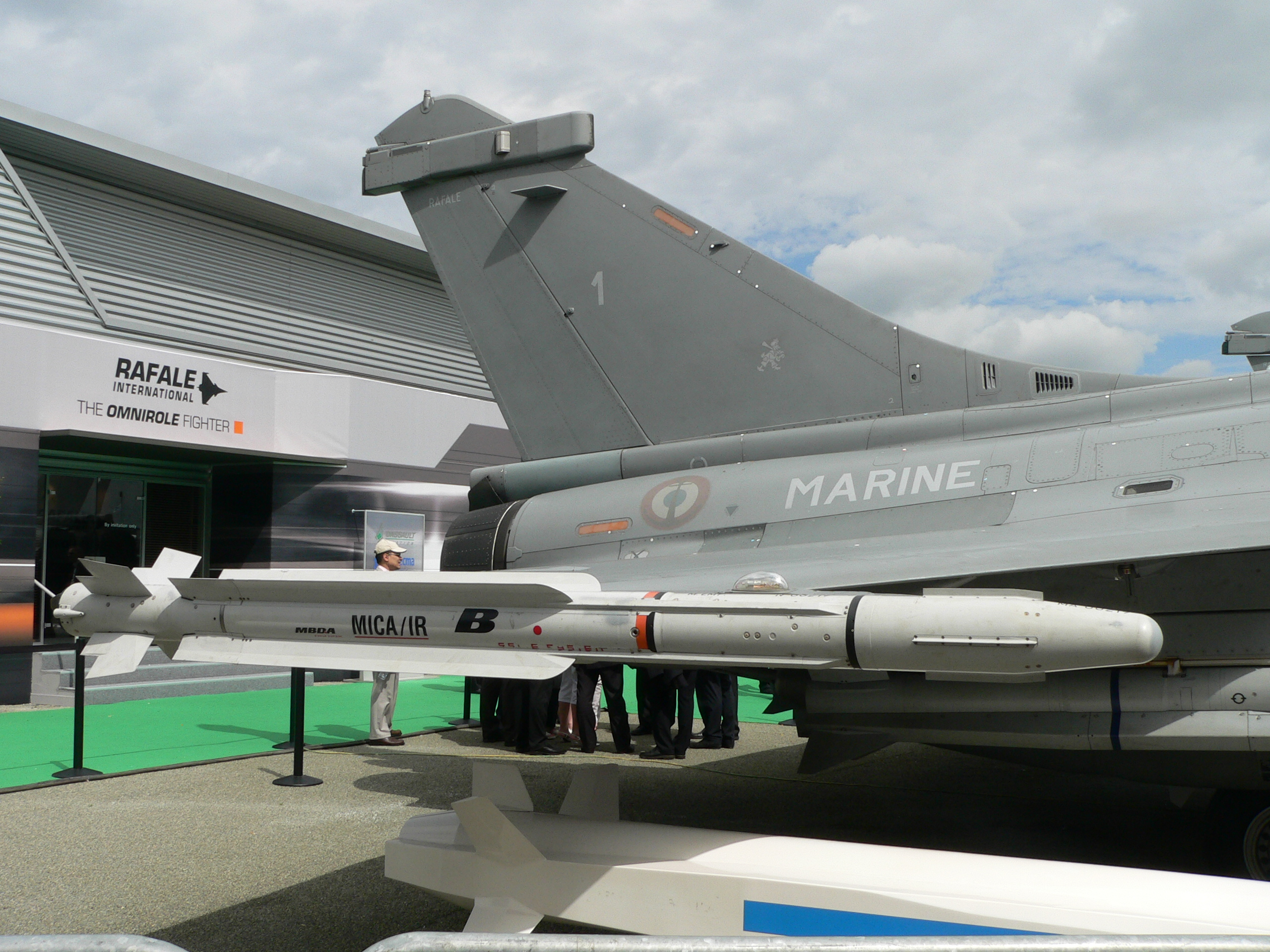 MBDA MICA on a Dassault Rafale Marine